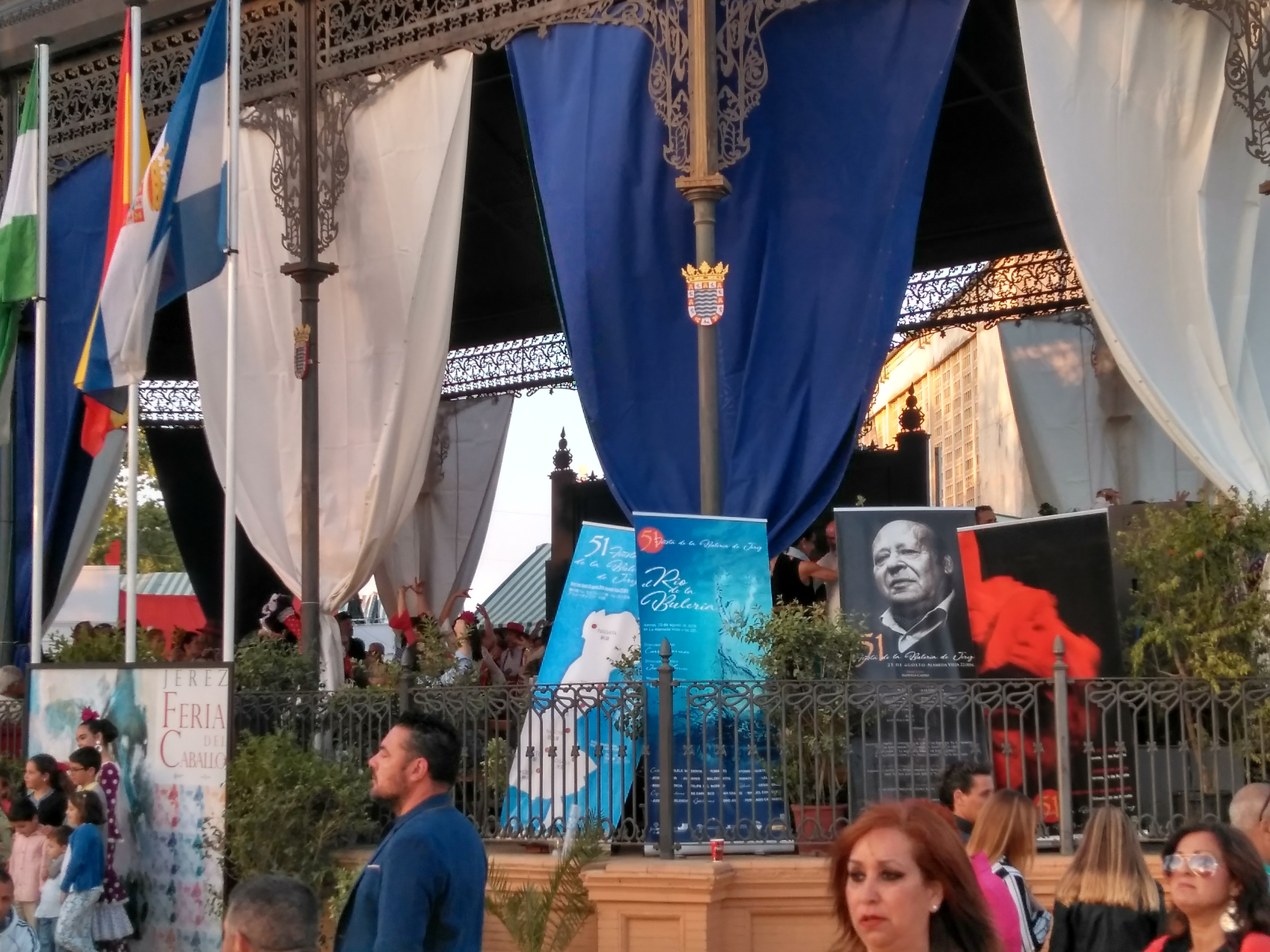 Cartel anunciador de la 51ª Fiesta de la Bulería, Dedicada a Manuel Moneo. En la caseta municipal de la Feria del Caballo 2018 (Jerez de la Frontera, España)